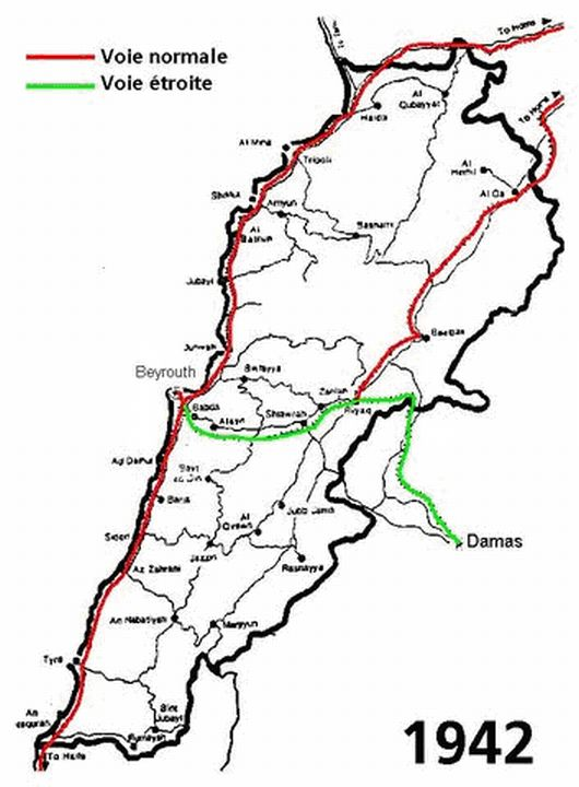 Carte du réseau ferré libanais en 1942